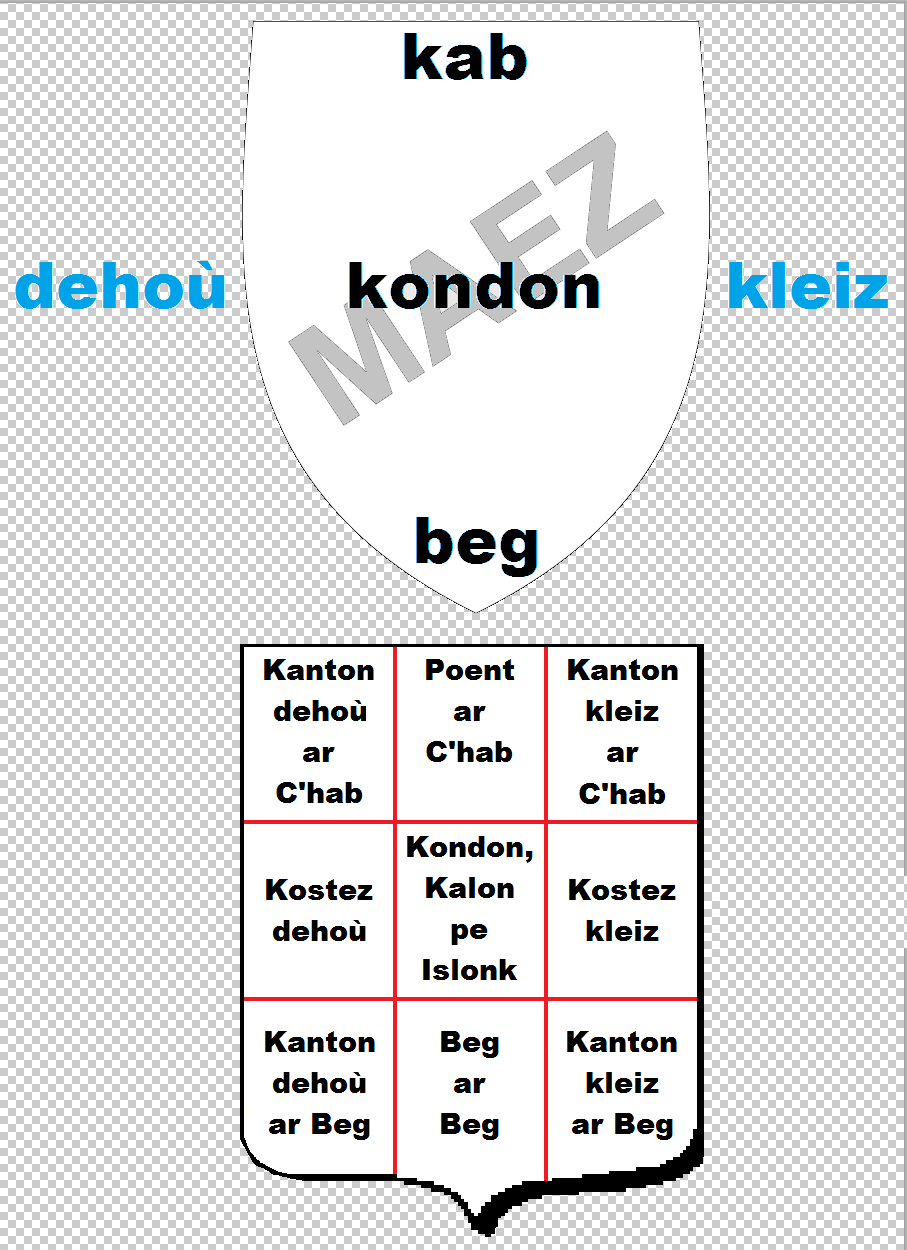 Tachennoù ur skoed-ardamez : ar maez eo ar foñs, ar c'hab al laez, ar c'hondon ar c'hreiz, ar beg an traoñ ; dehoù ha kleiz zo gwelet diouzh tu douger ar skoed.